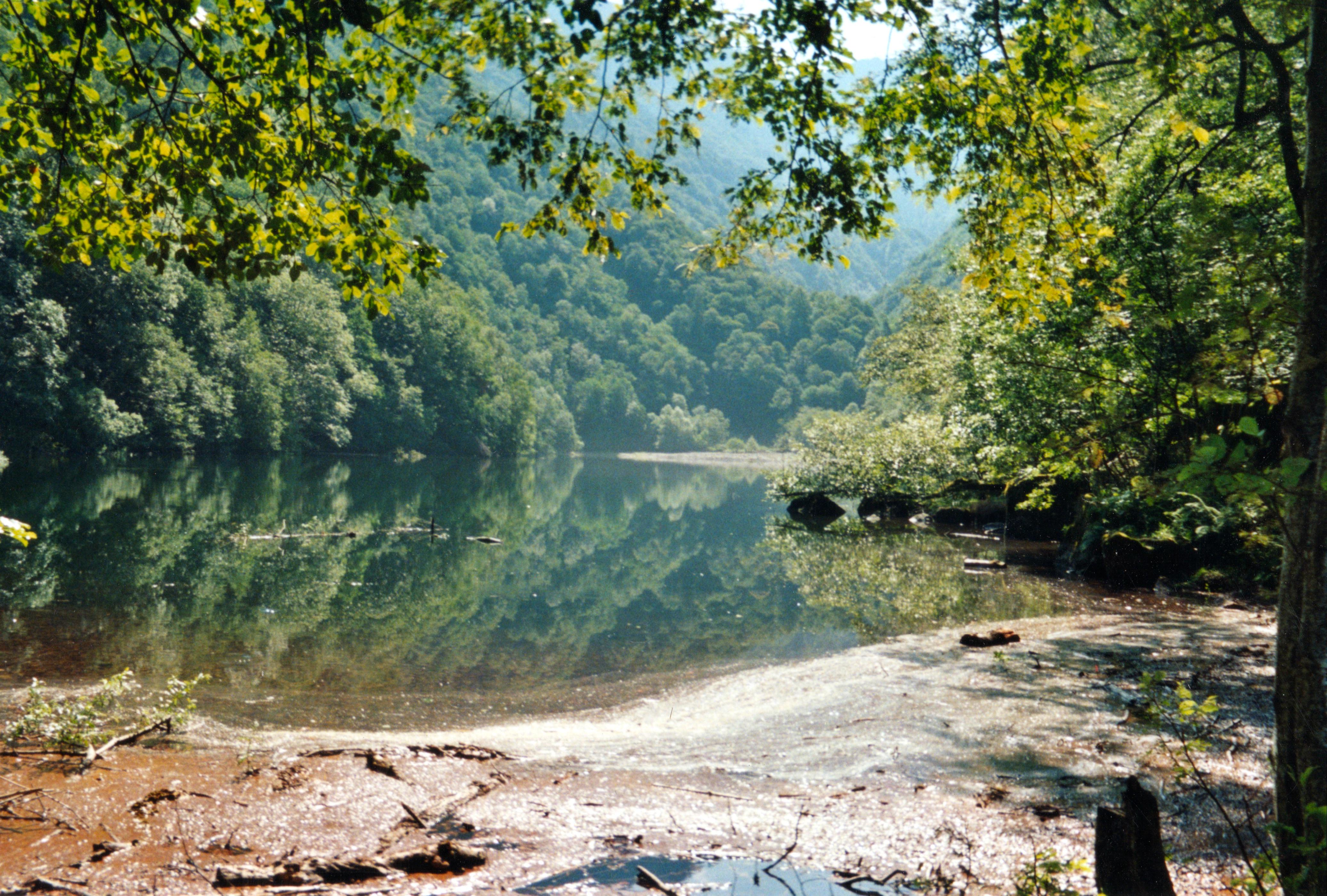 Il laghetto di Orbello